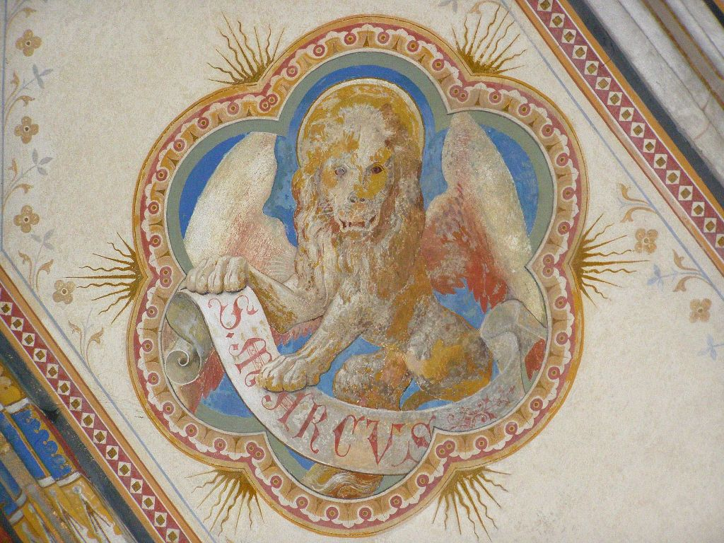 Medailón s levom - atribútom svätého Marka